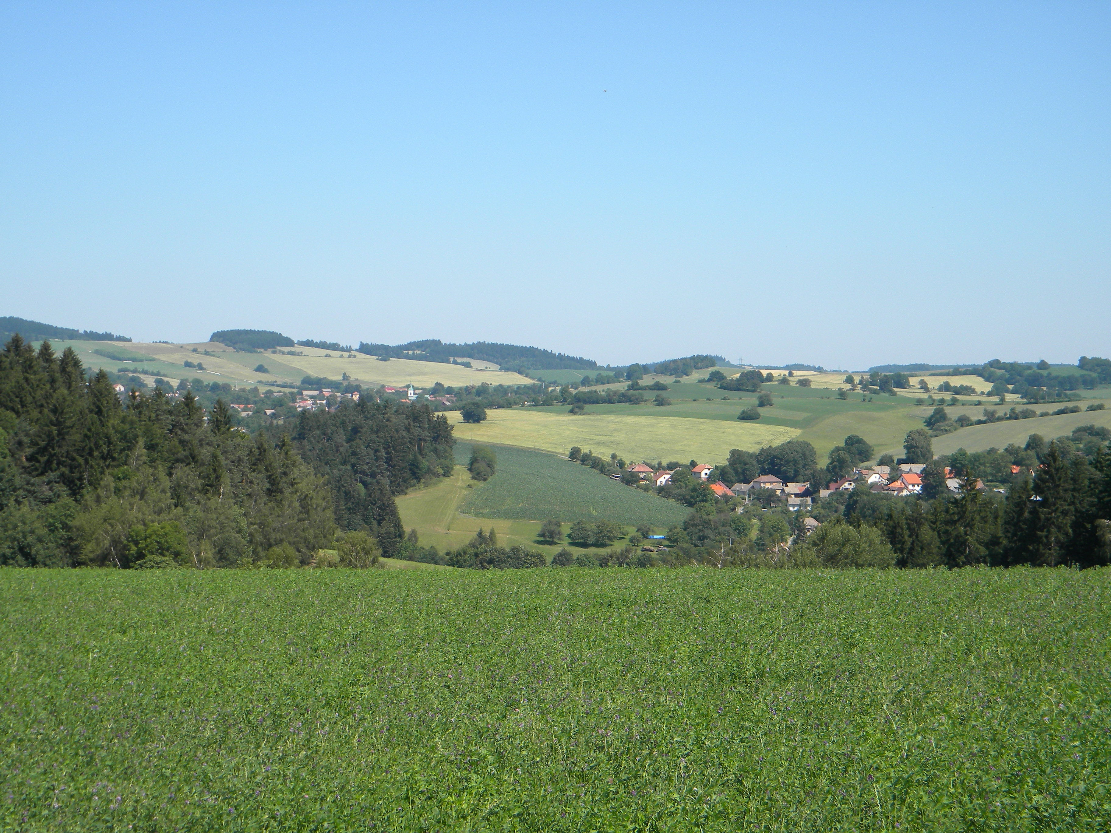 Malé Tresné, v pozadí Rovečné